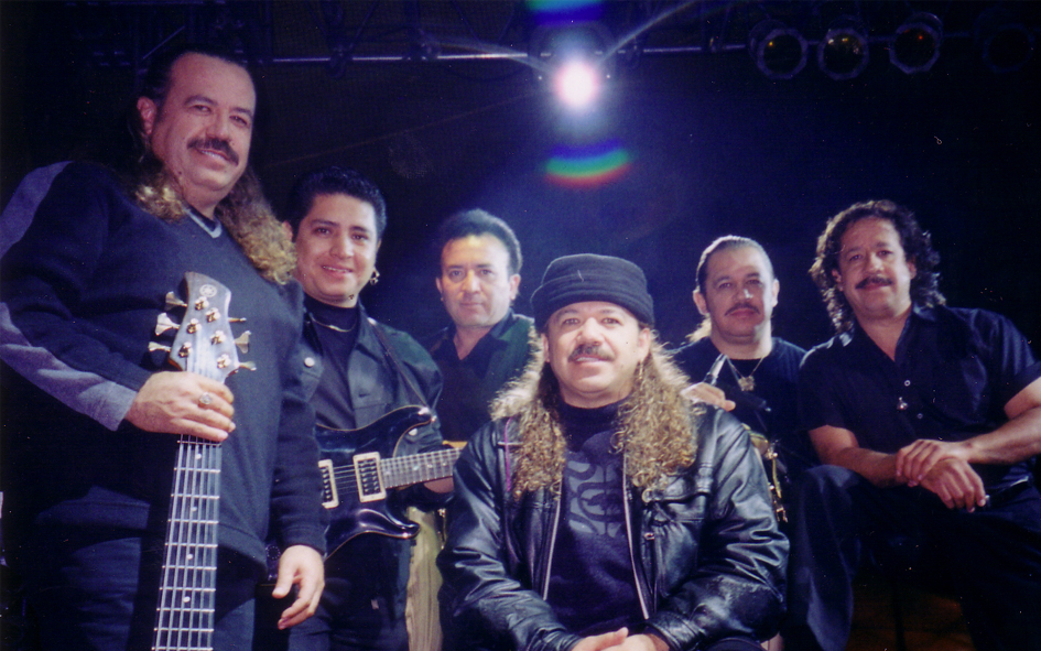 Los Acosta antes de salir al escenario. (detrás del pibe valderrama, Mario Carrillo)